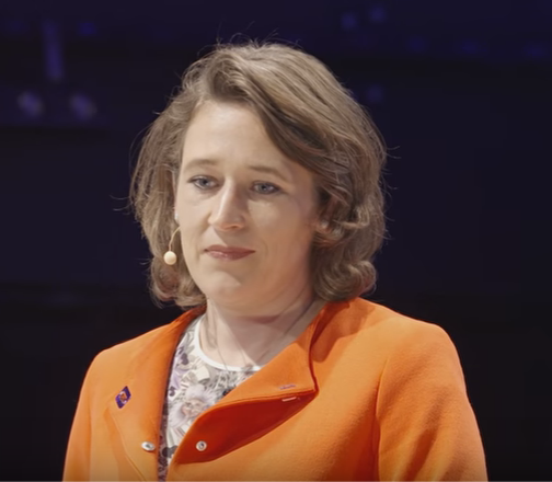 Andrea Britta Maier (Aurich, 1978) is een Duits hoogleraar gespecialiseerd in veroudering.